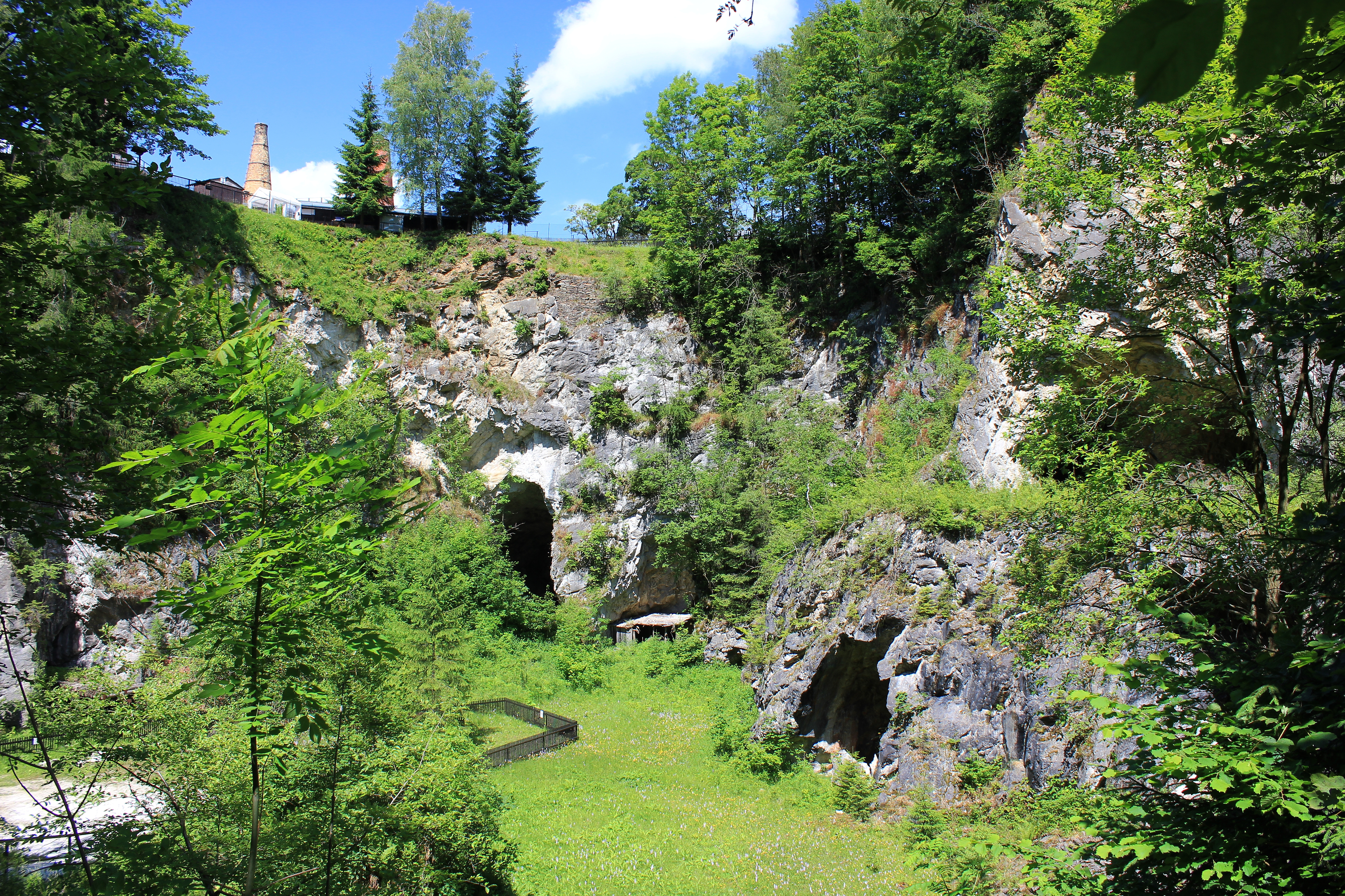 Blick in den alten Tagebruch. Kalkwerk Lengefeld Erzgebirge; Pockau (OT Lengefeld).